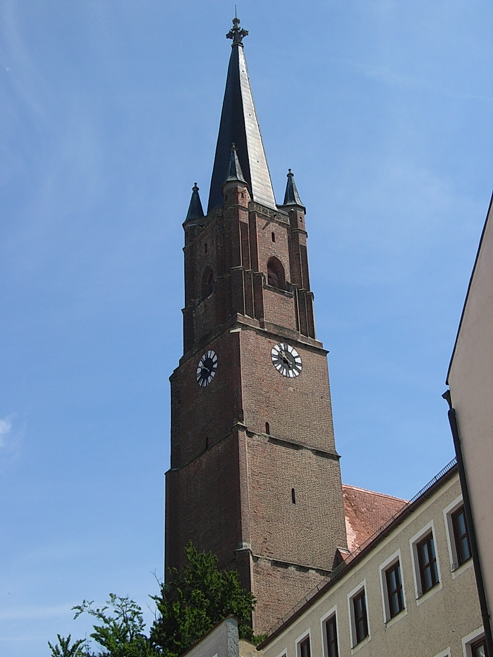 Turm der Stadtpfarrkirche St. Nikolaus und Stephan in Eggenfelden